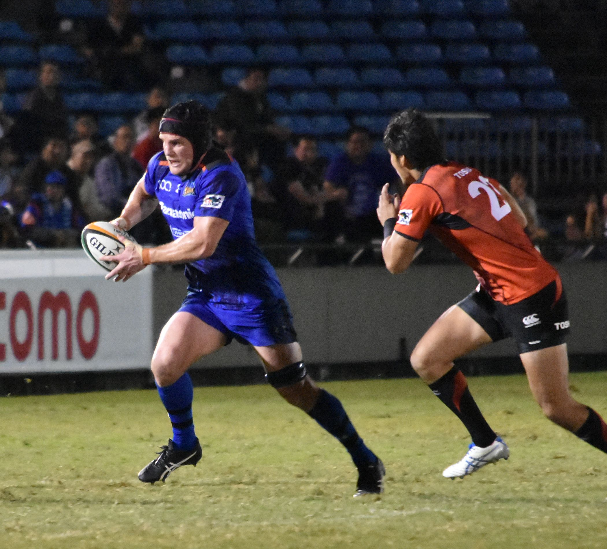 マット・トッド